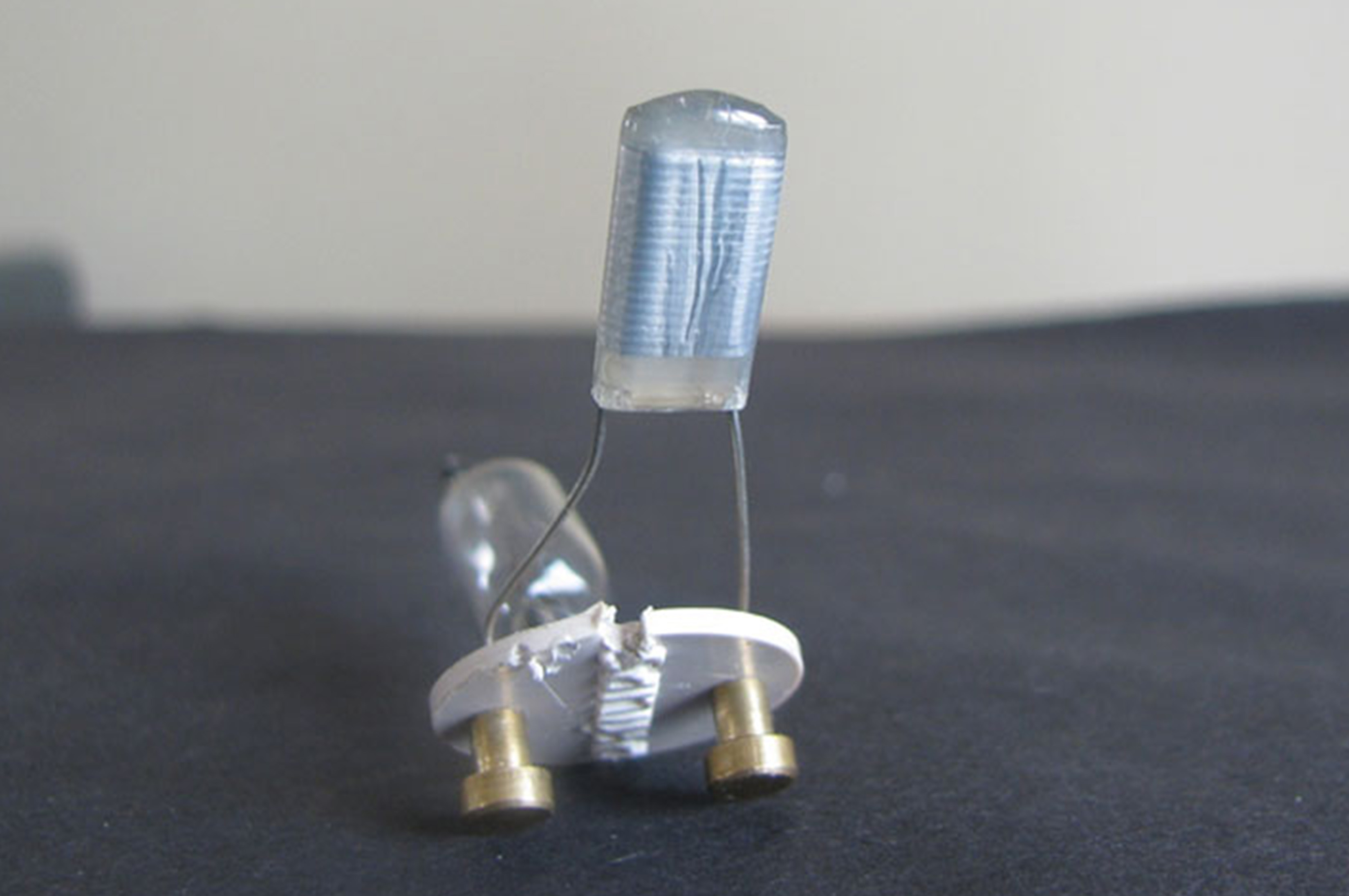 မြန်မာဘာသာ: Starter ကိုတွေ့မြင်ရစဉ်